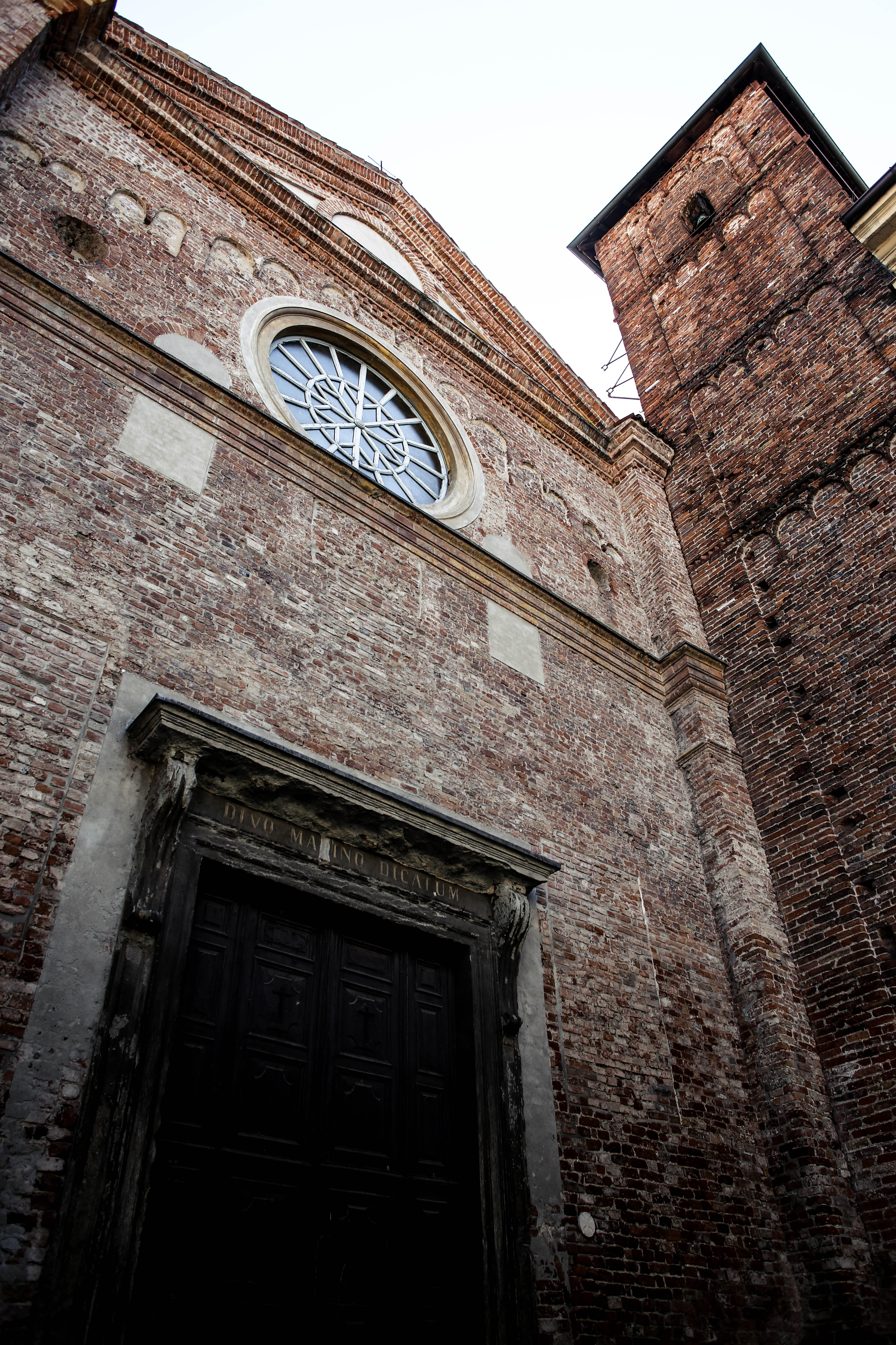 chiesa di San Marino This is a photo of a monument which is part of cultural heritage of Italy.